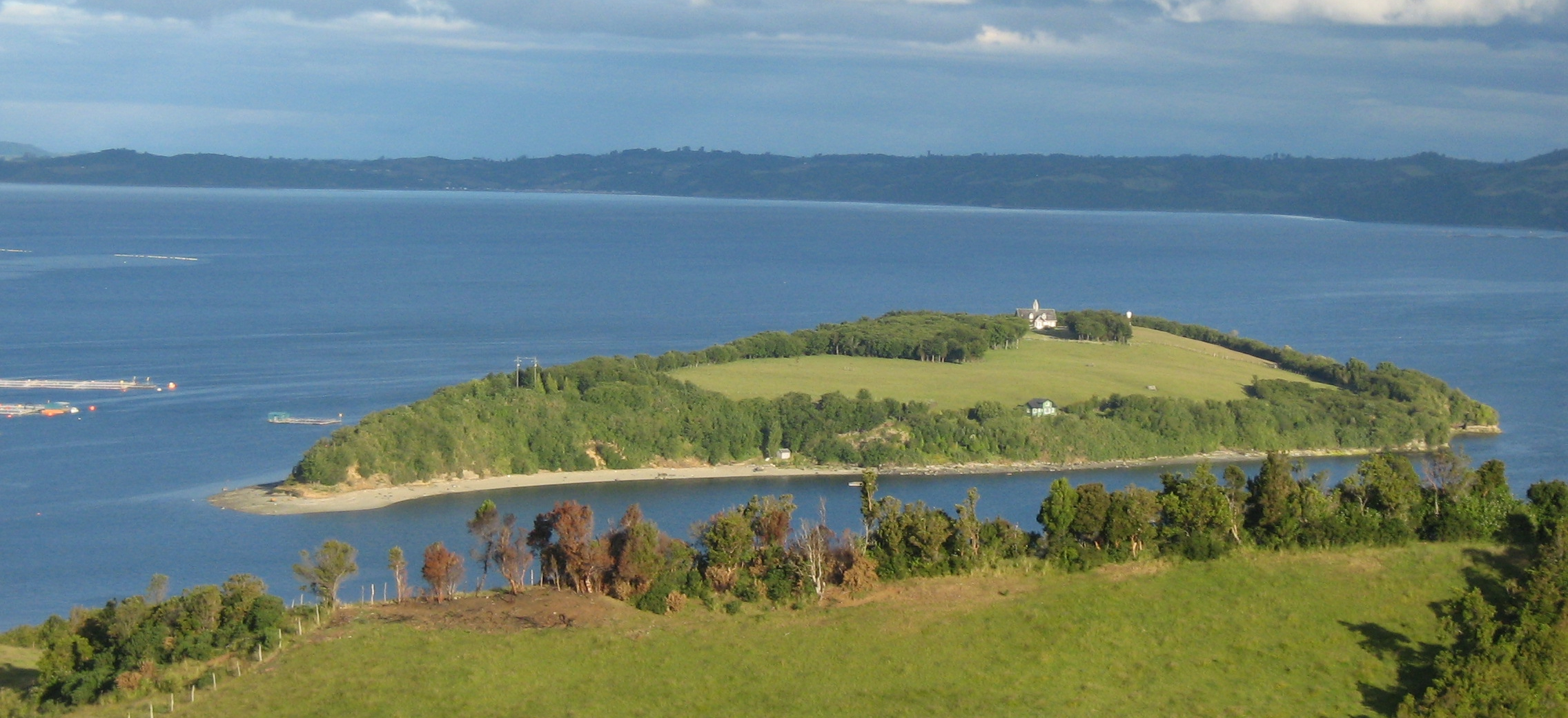 Linlinao y Quinched, comuna de Chonchi, archipiélago de Chiloé, Chile.